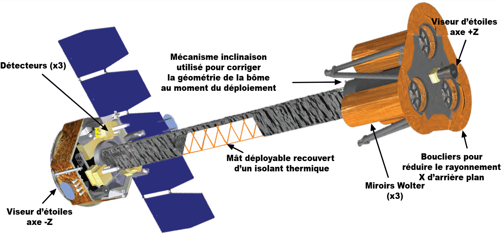 Vue d'artiste du télescope spatial de la NASA IXPE (légendes en francais)